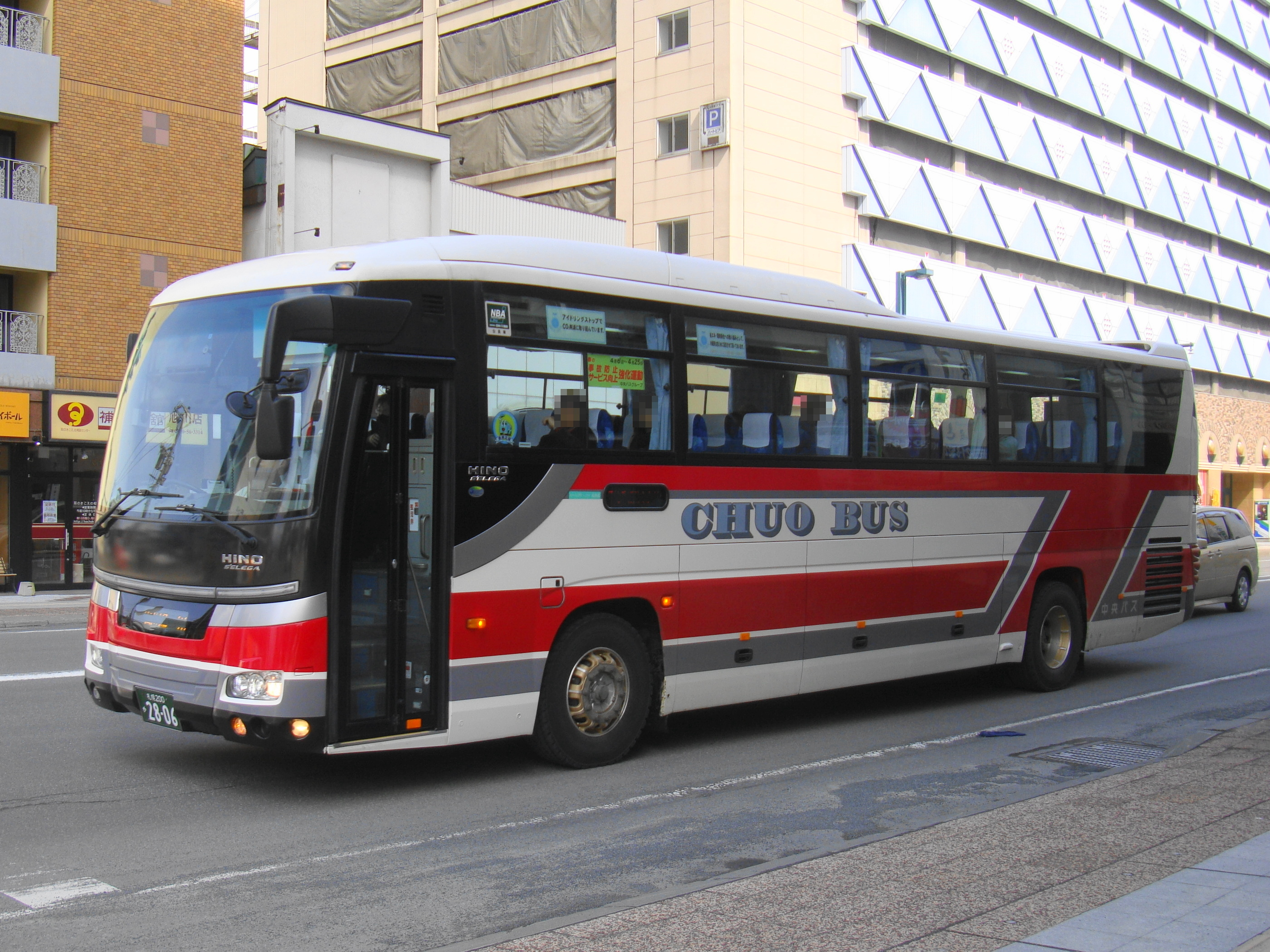 "Kōsoku Asahikawa gō" Sapporo to Asahikawa